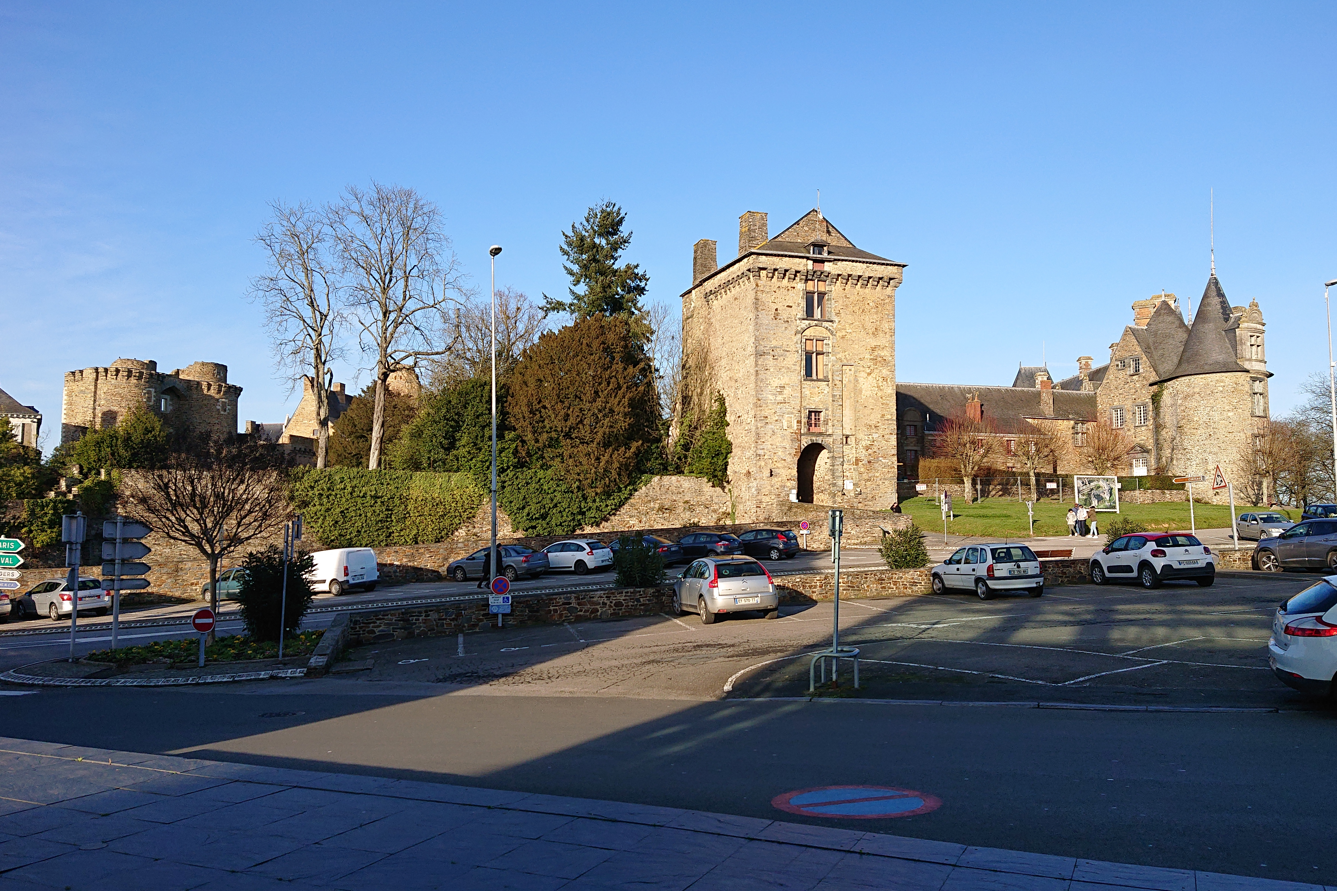 Vue depuis le sud du Château de Châteaubriant, France.